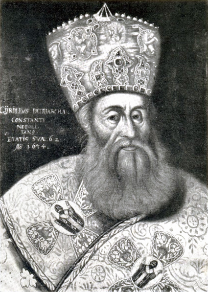 Патриарх Кирилл (Лукарис)